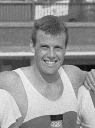 Europese roeikampioenschappen Bosbaan, Deense en Duitse met poserend. ID